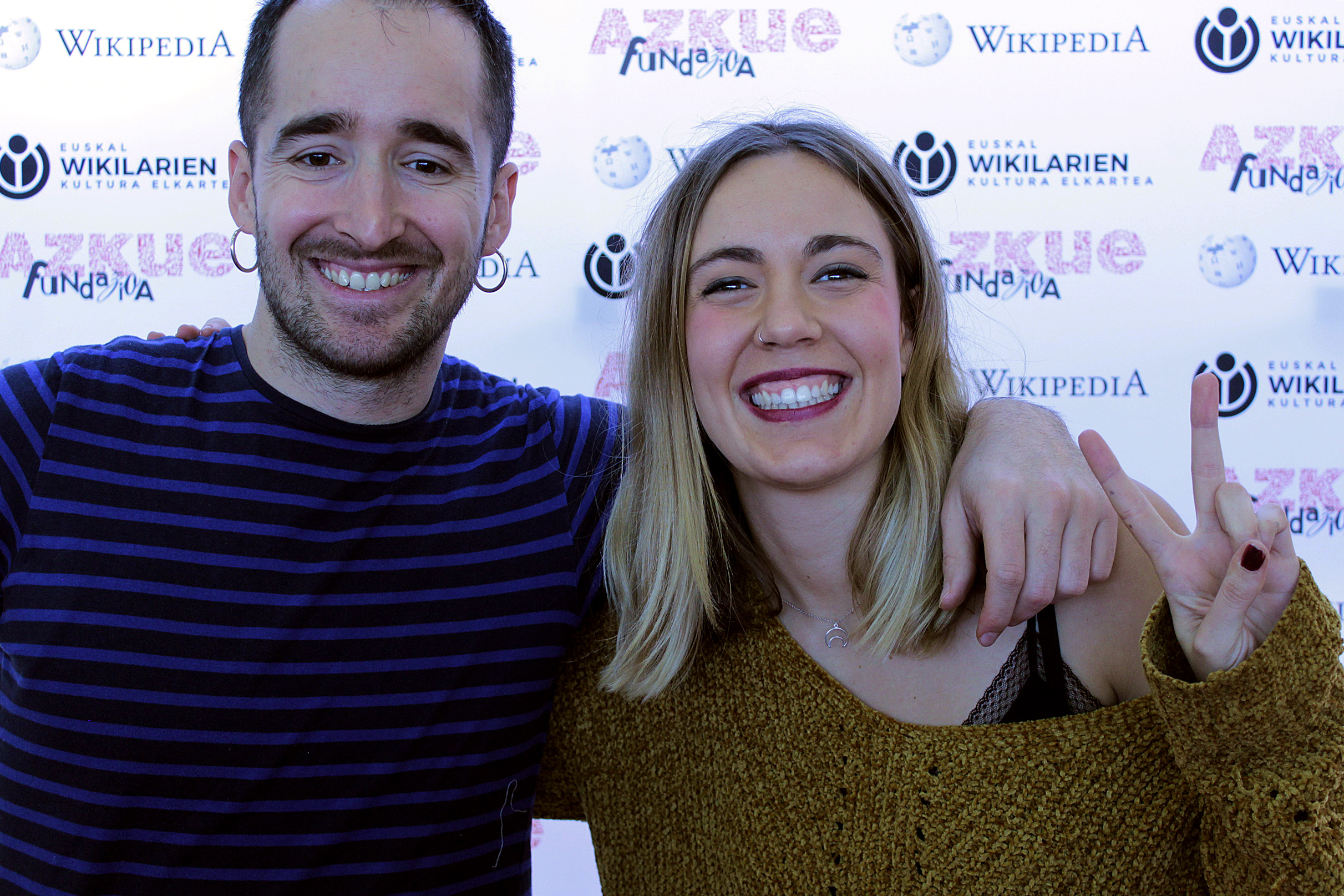 Hesian musika taldeko Fran eta Zuriñe abeslariak Azkue Fundazioaren eta Euskal Wikilarien Kultura Elkartearen photocallean